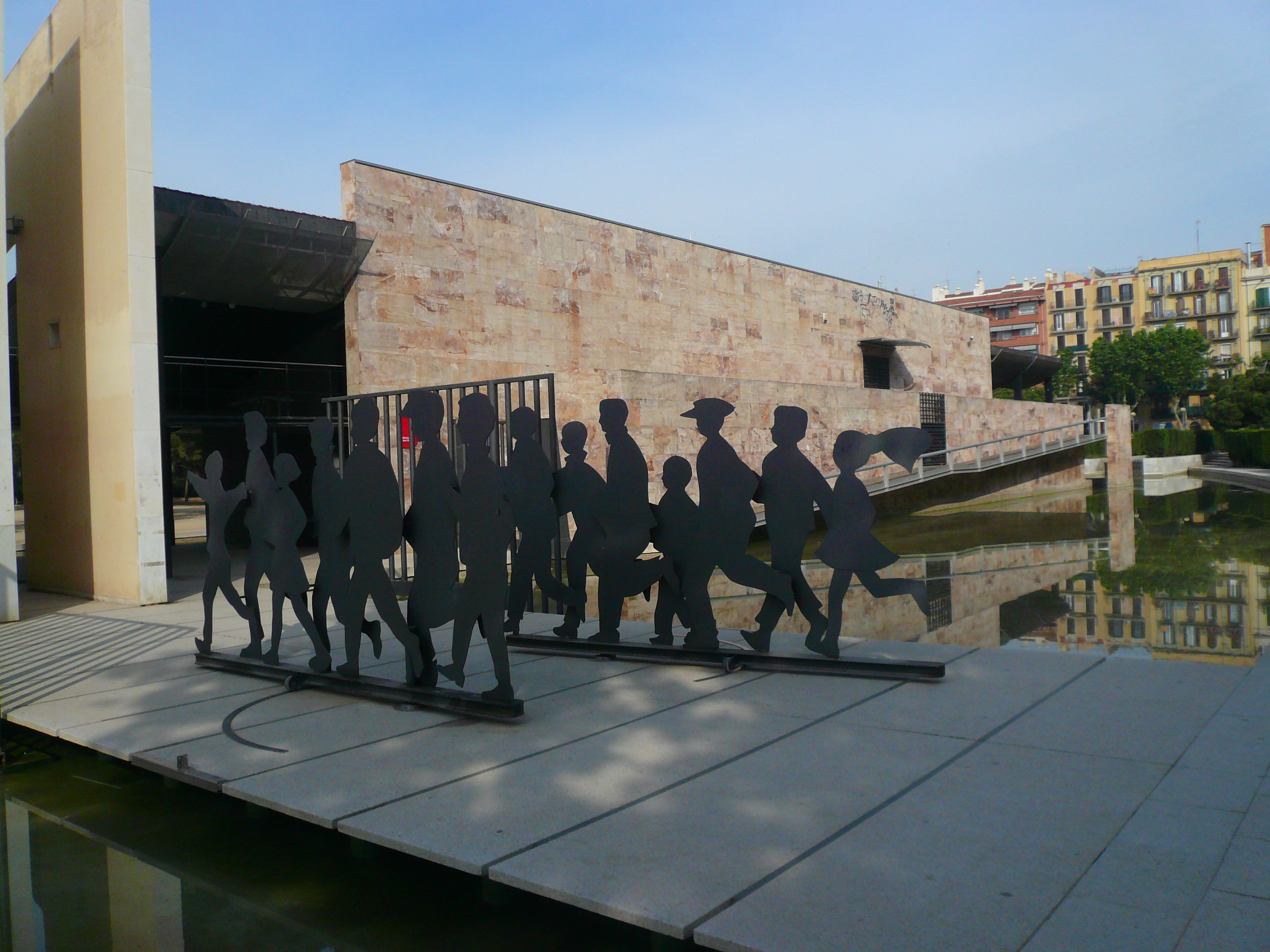 Escolars. Parc de Joan Miró, Biblioteca Joan Miró (Barcelona). Disseny: Màrius Quintana, Beth Galí, Antoni Solanas, Andreu Arriola. Material: acer pintat negre. 1990. 43″ N, 2° 08′ 57.19″ E